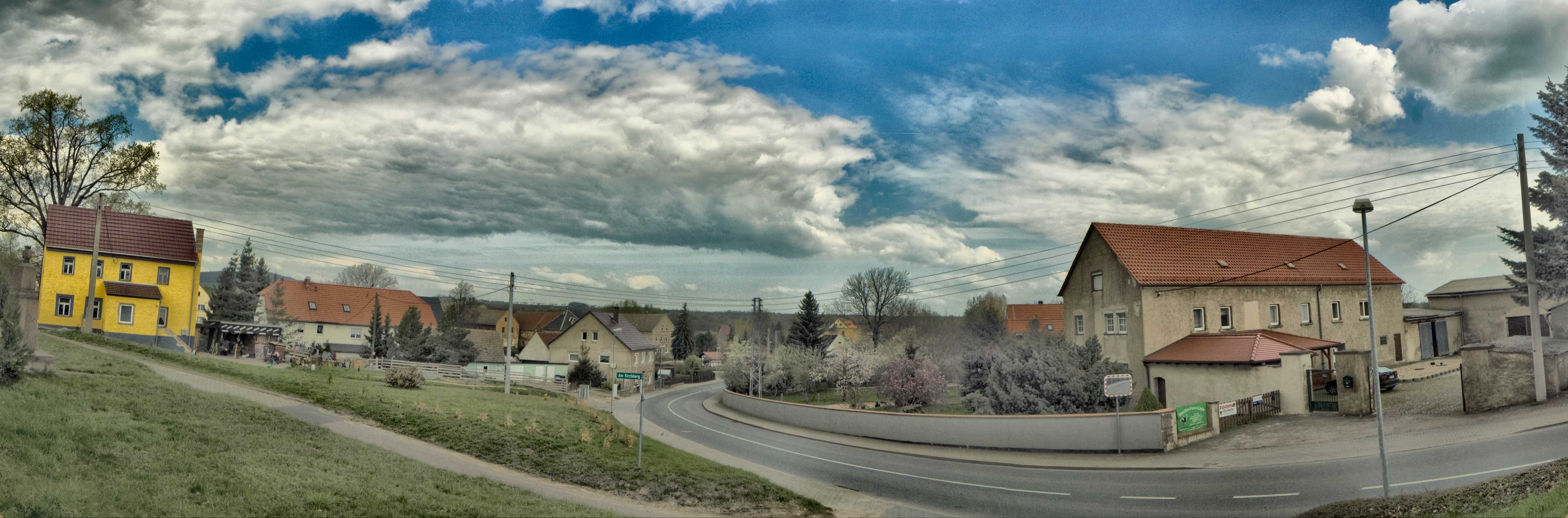 Dorfpanorama Lampersdorf, Gemeinde Wermsdorf in Sachsen